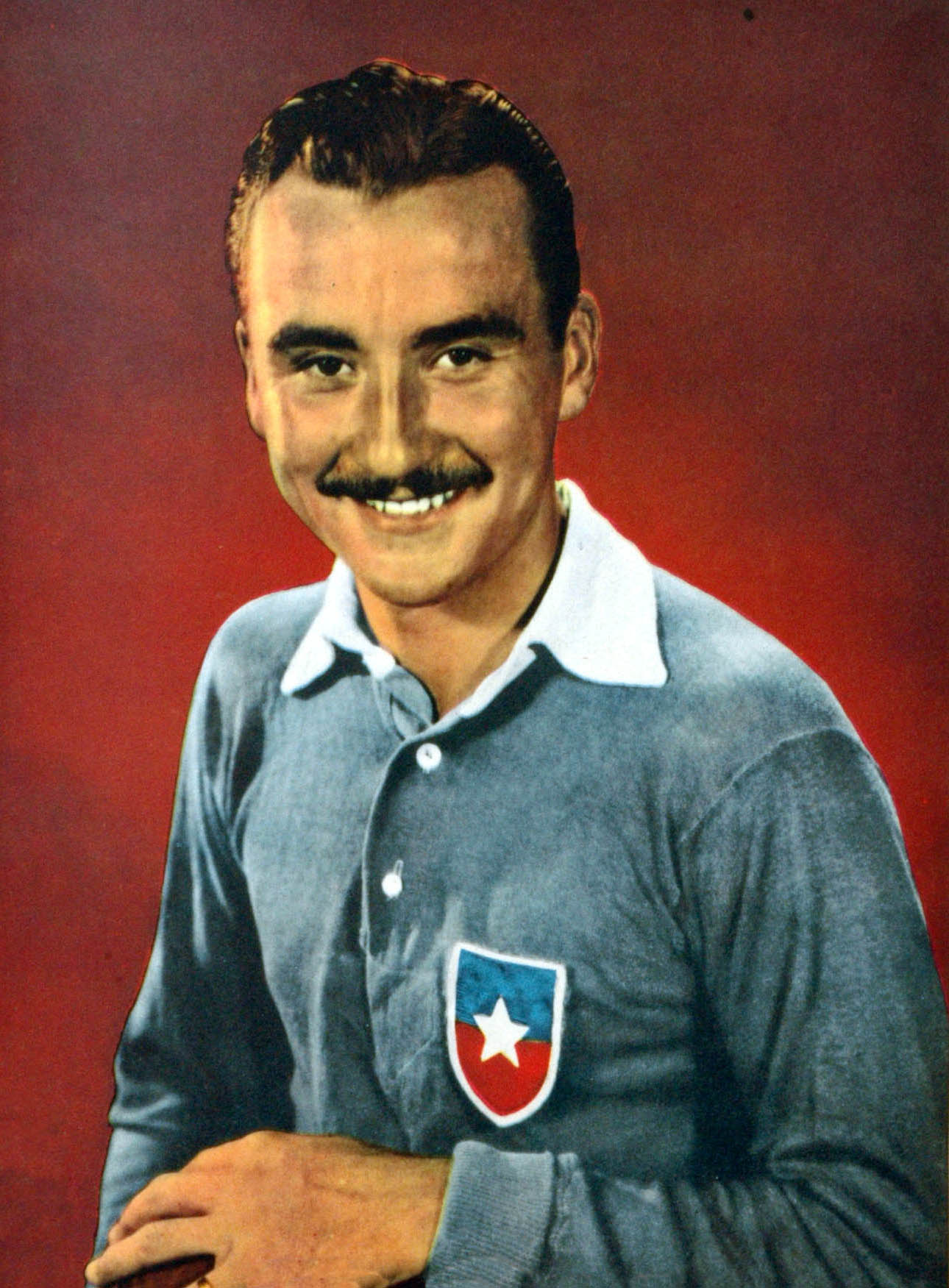 Sergio Roberto Livingstone Pohlhammer (*Santiago de Chile, 26 de marzo de 1920). Fue un gran futbolista y actualmente es un comentarista deportivo de Television Nacional de Chile y conductor del programa Zoom Deportivo. Es apodado "Sapo" por la forma que tenía de atajar.